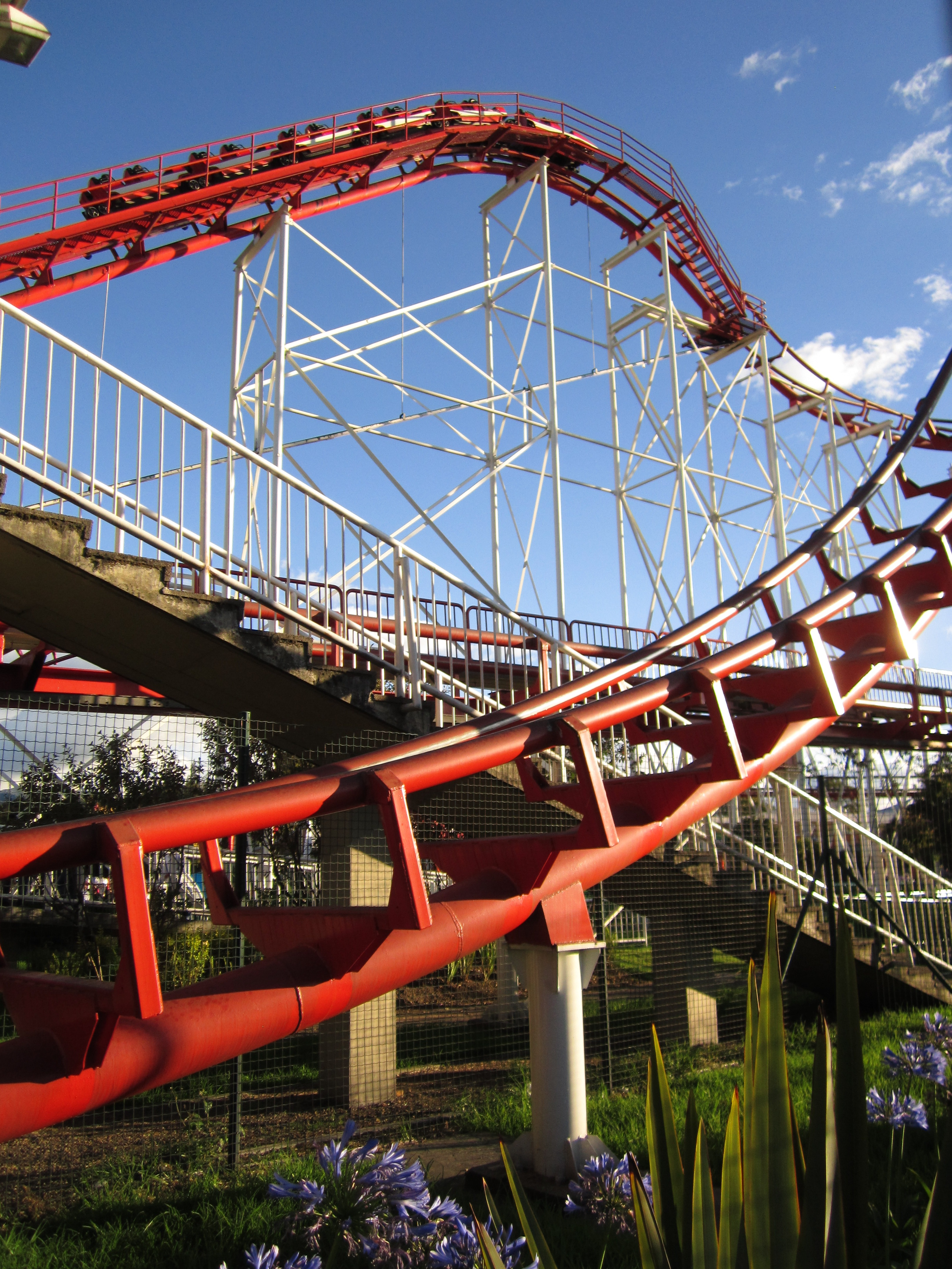 Bogotá Salitre Mágico.